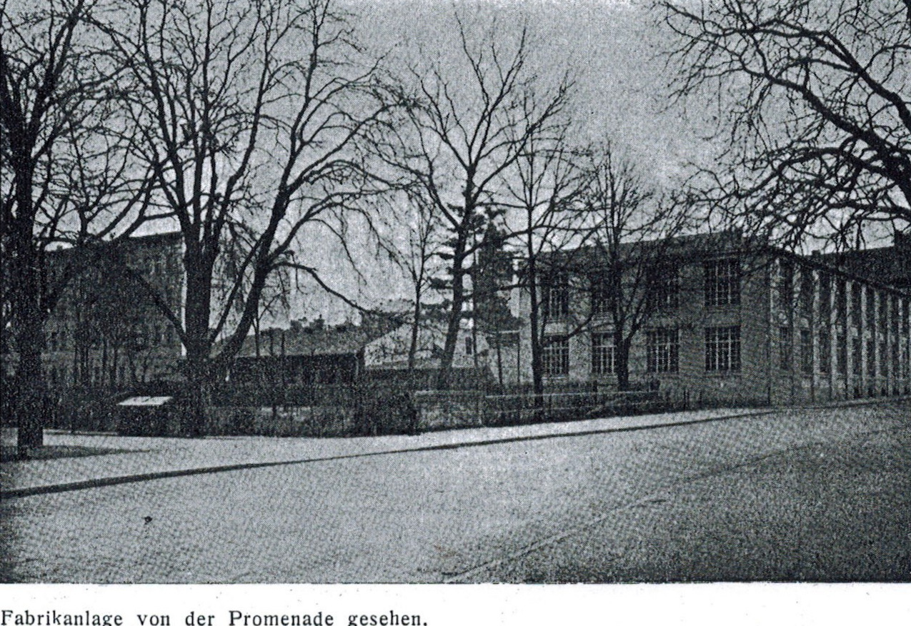 Gebrüder Fritsch, früher